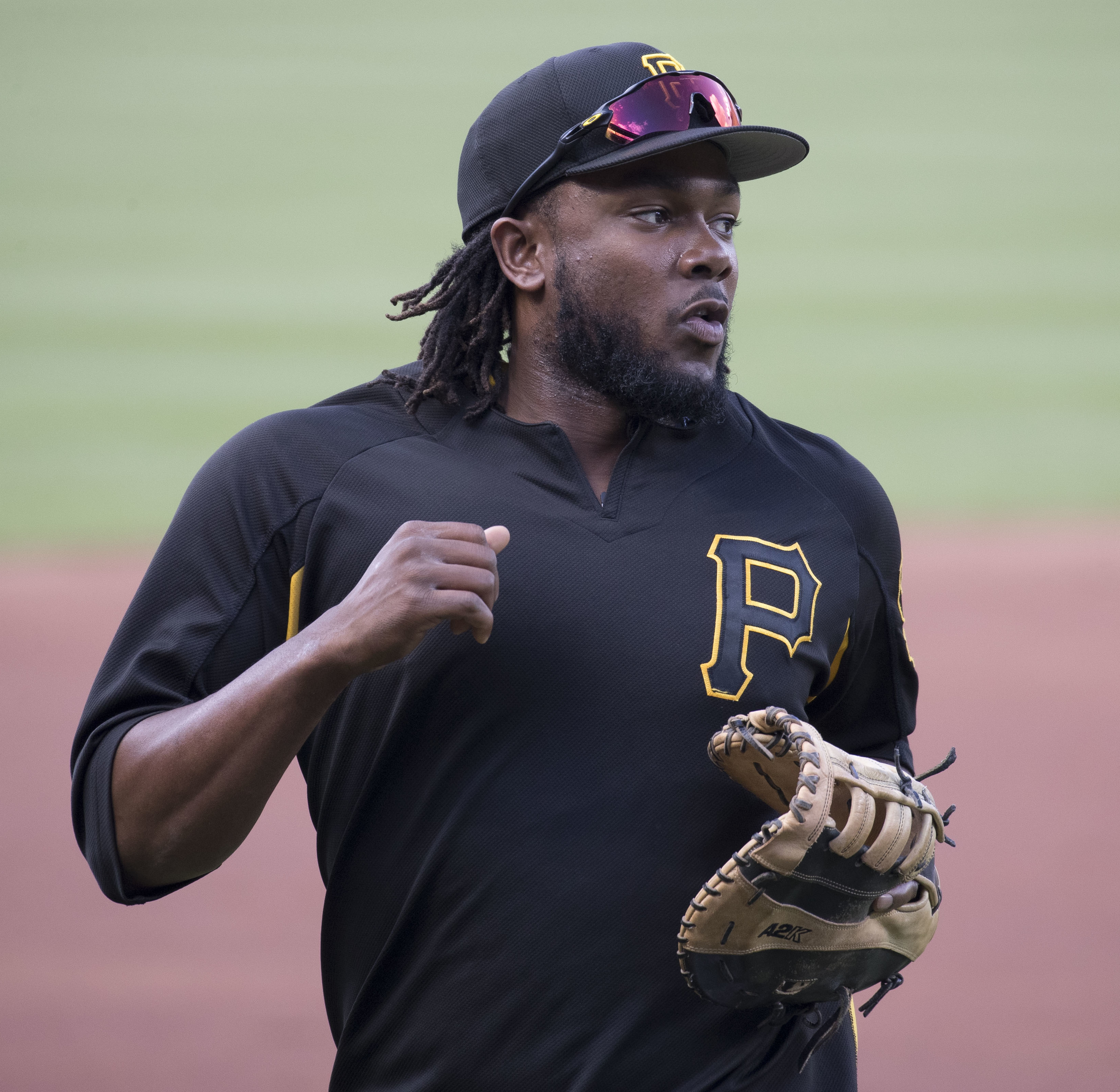 Pirates at Orioles 6/6/17